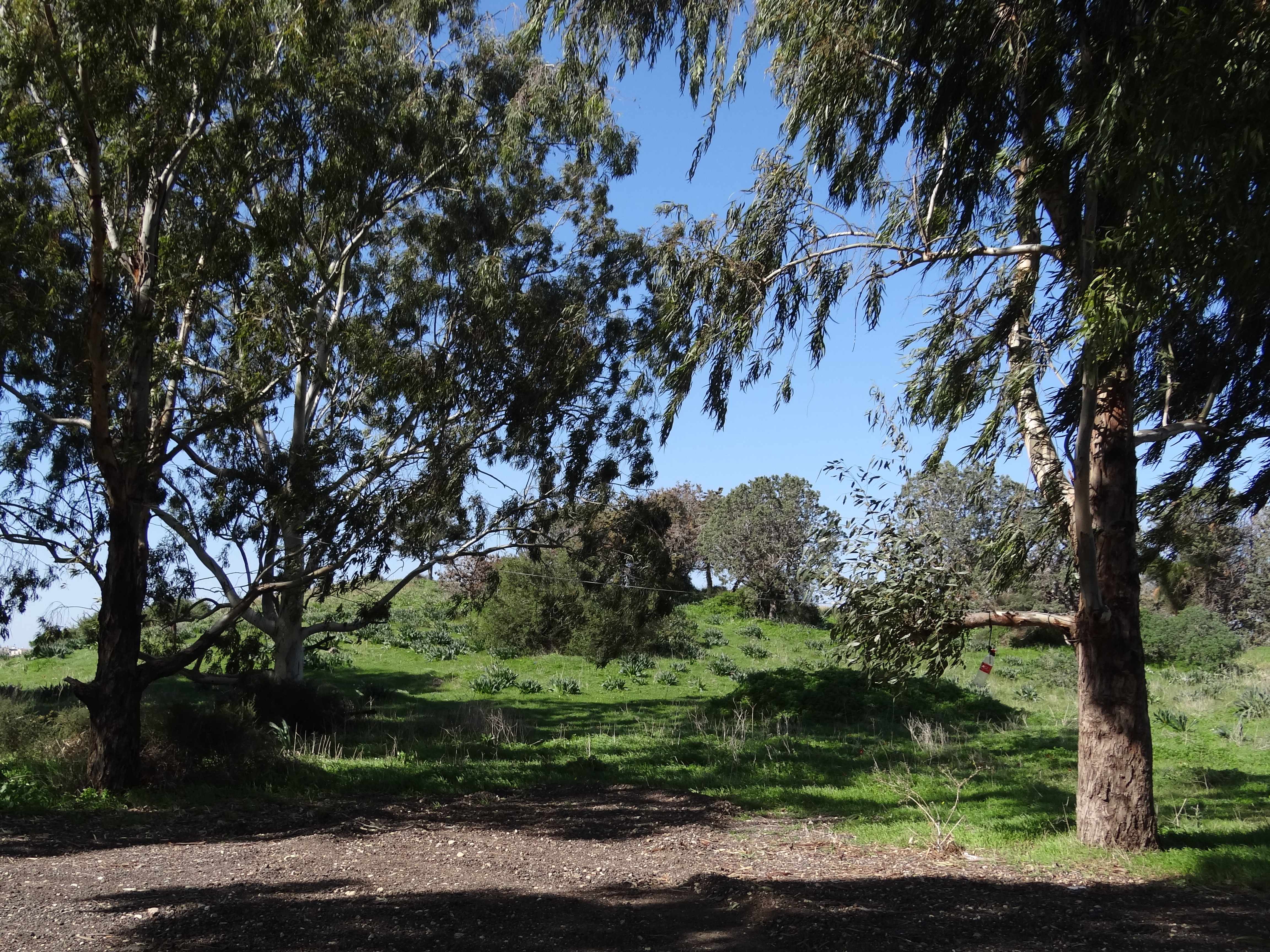 Tel Mevorach, Archaeology sitein Israel near Nahal Taninim תל מבורך הוא תל קטן השוכן על הגדה הדרומית של נחל תנינים בכניסה ליישוב בית חנניה. בחפירות הארכאולוגיות באתר נמצאו שרידים מתקופת הברונזה התיכונה, תקופת הברונזה המאוחרת, תקופת הברזל, התקופה הפרסית ומעוט שרידים מהתקופה ההלניסטית עד הערבית המאוחרת.